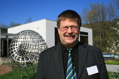 Foto di Ulrich Langer